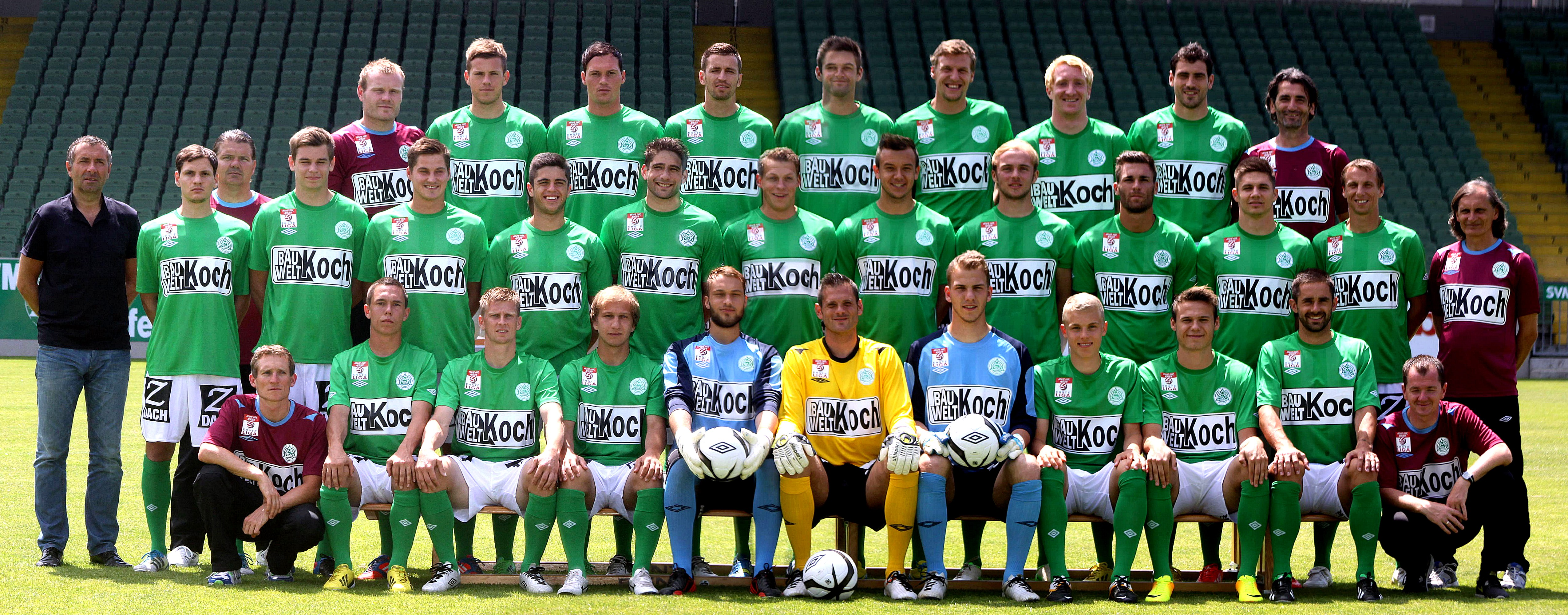 Kadervorstellung SV Mattersburg am 1. Juli 2013 im Mattersburger Pappelstadion. - Das Foto zeigt de:. en Teampresentation SV Mattersburg at 2013-07-01 in Pappelstadion Mattersburg. – The photo shows en:. {